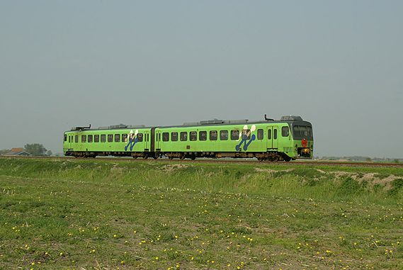 Wadkikker 3222 Noordned